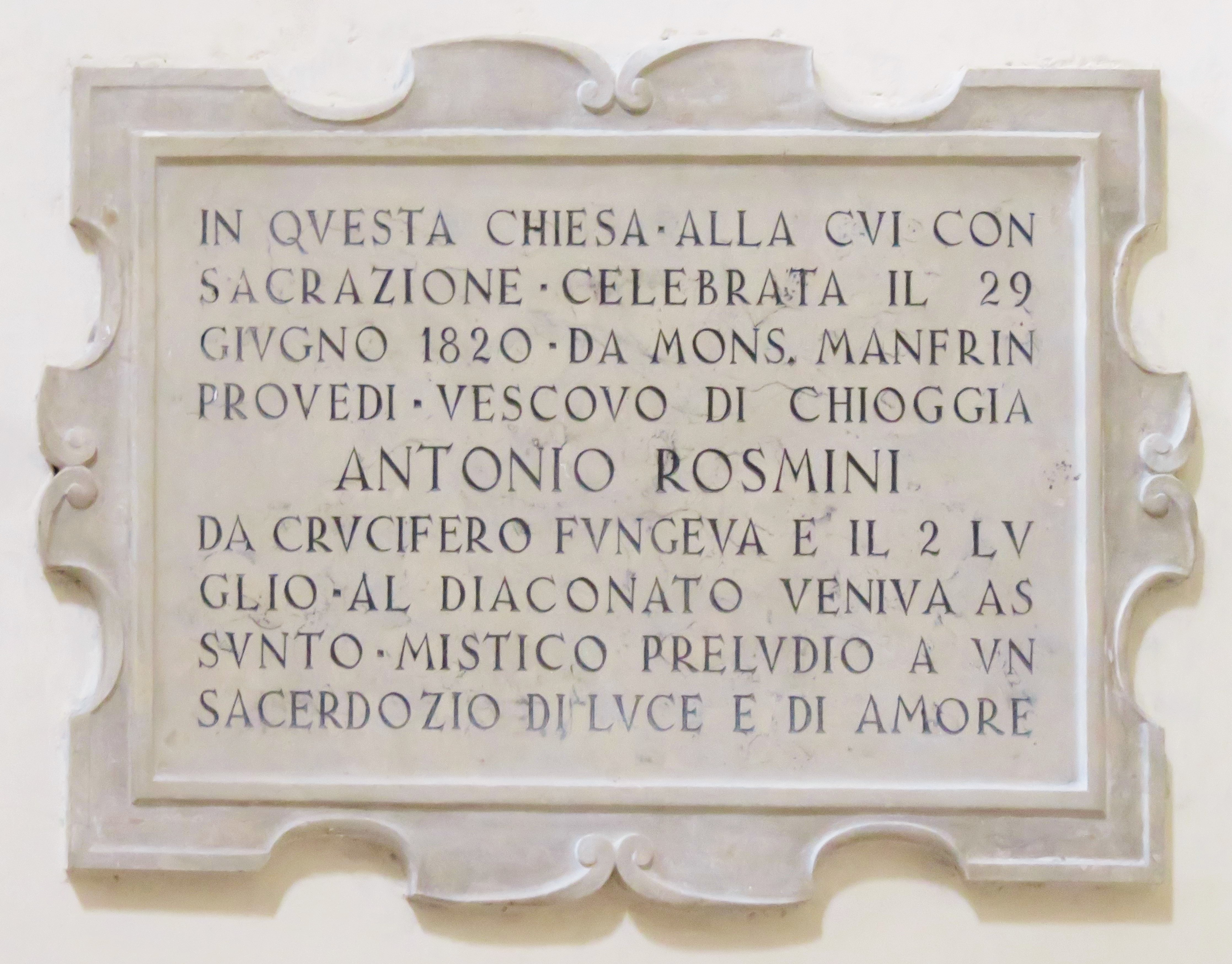 Epigrafe con citazione di Antonio Rosmini a ricordo del conferimento del diaconato da parte del vescovo di Chioggia Giuseppe Manfrin Provedi il 2 luglio 1820